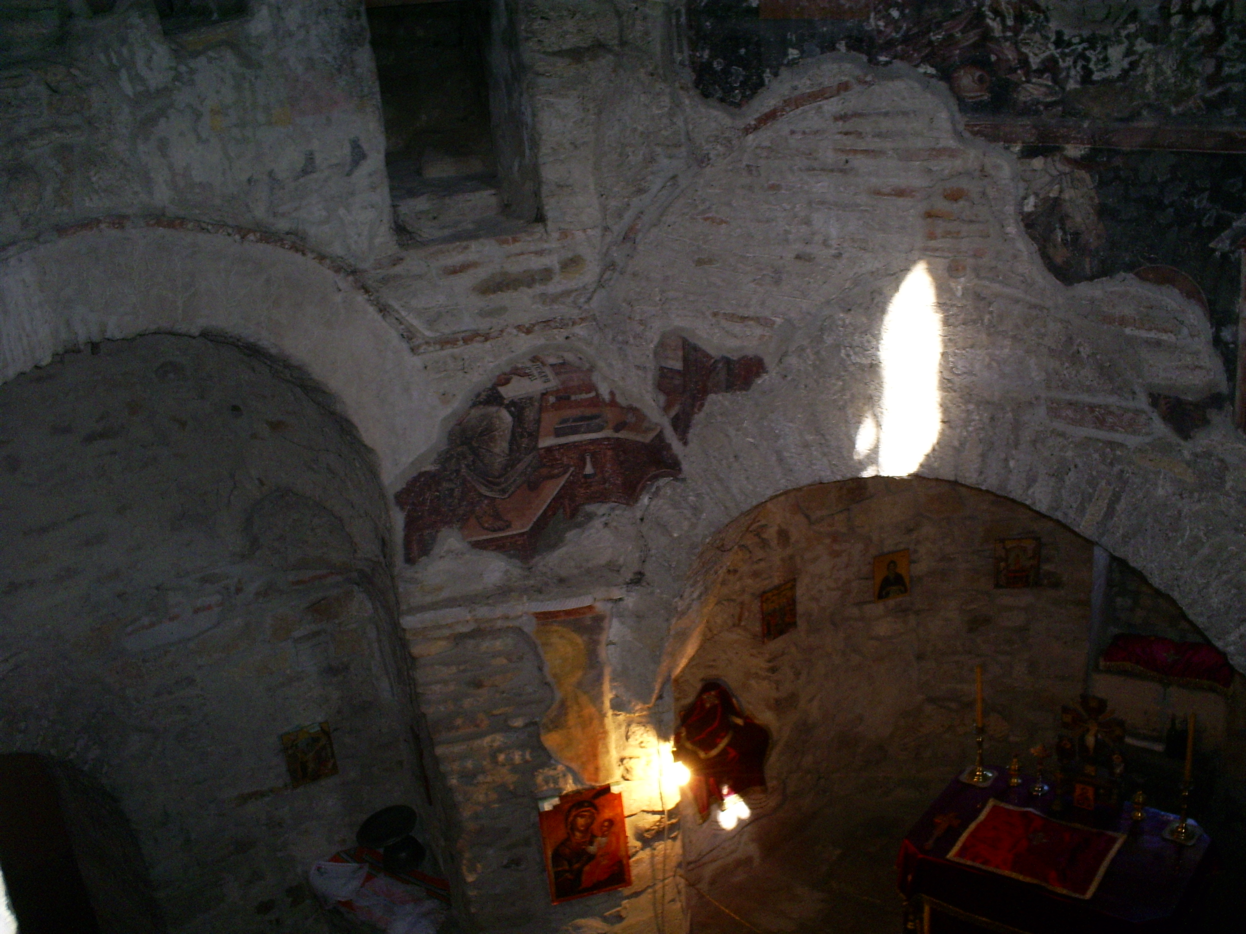 Petrova crkva, pogled sa "galerije"